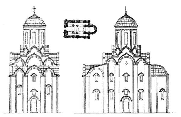 Собор Спасо-Евфросиньевского монастыря близ Полоцка (1128-1156)